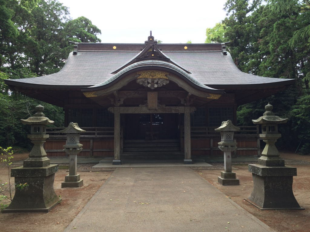 五所神社（山武市）拝殿